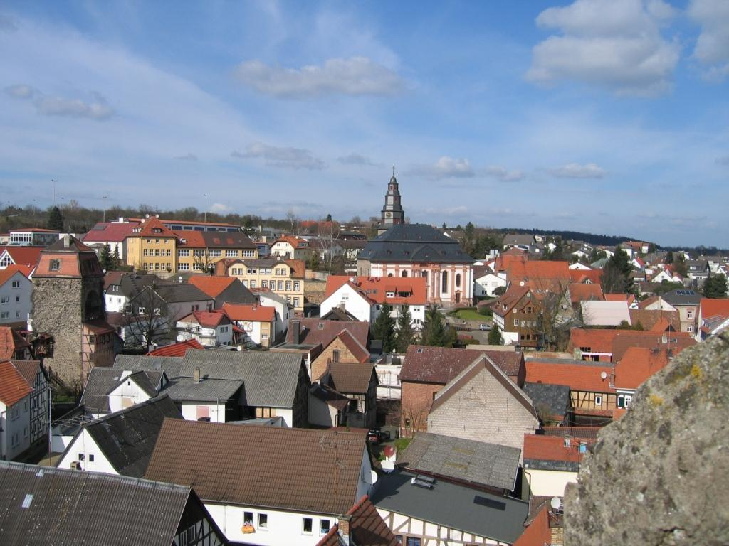 Blick vom Weißen Turm aus in Richtung Norden, ganz links ist der Schwarze Turm zu sehen und in der Mitte die Ev.-ref. Kirche